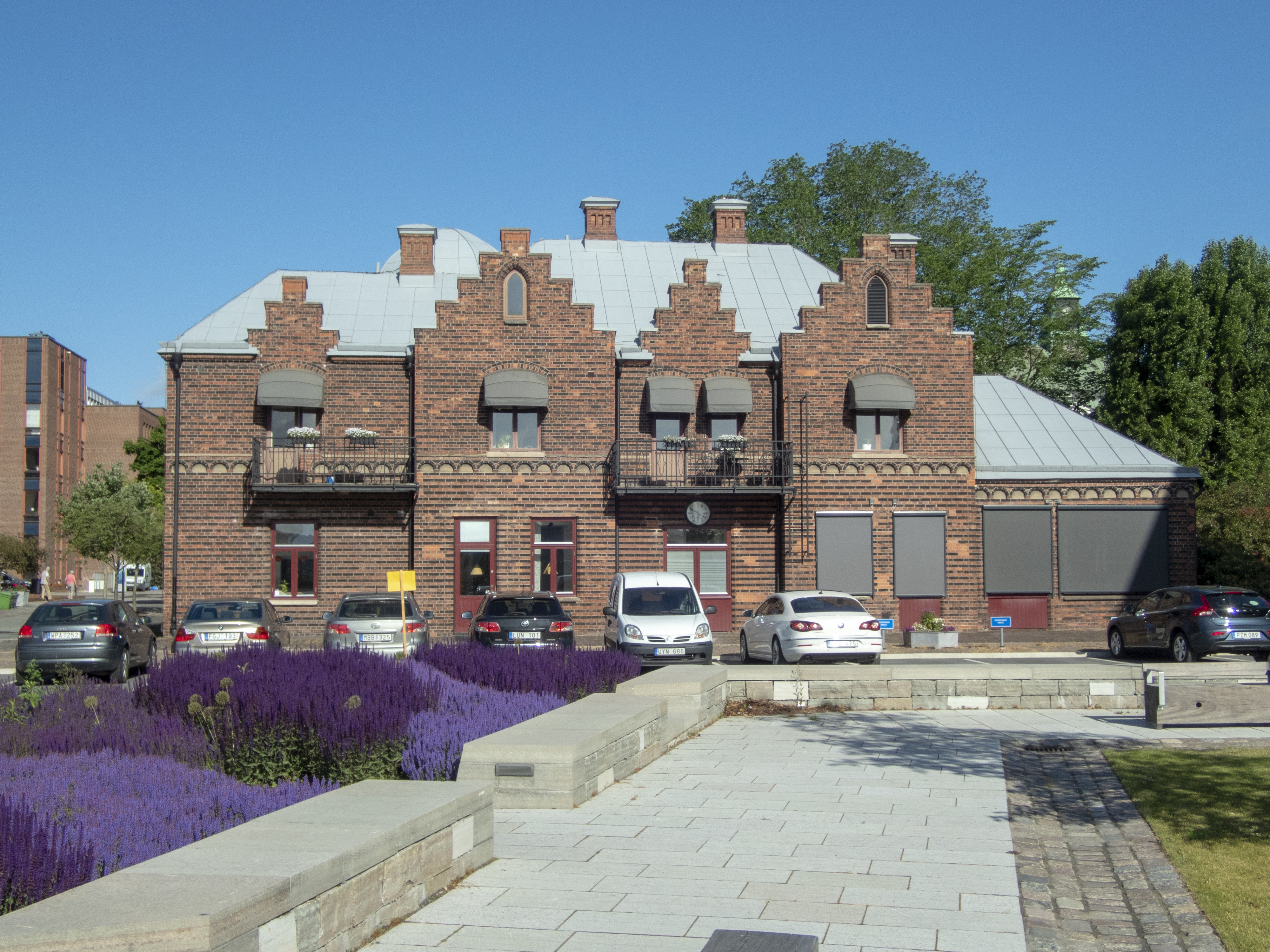 F.d. Jönköpings hamnstation, byggd 1894 för Jönköping-Vaggeryds järnväg. Arkitekt: Gustaf Lindgren